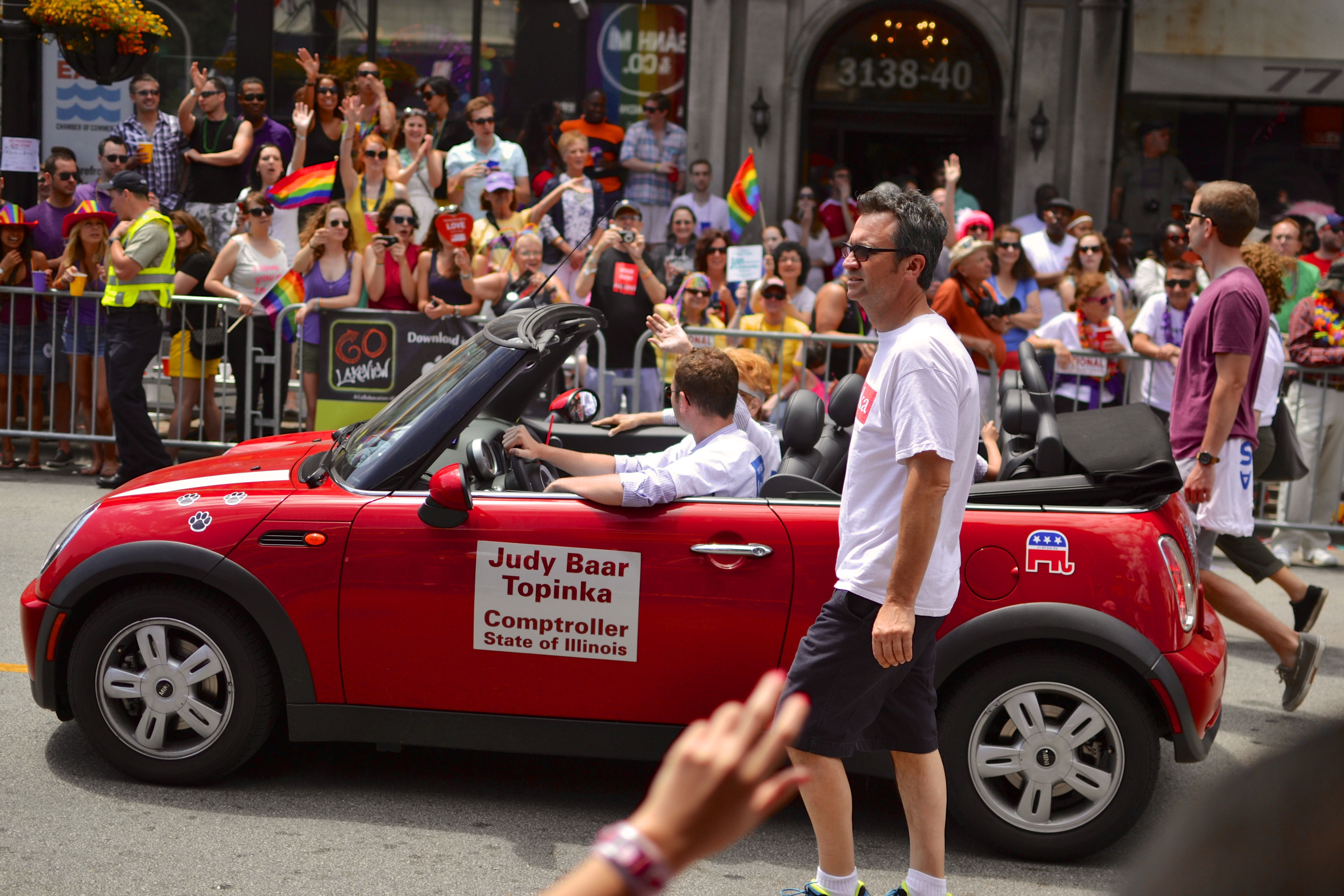 Her license plate is JBT.